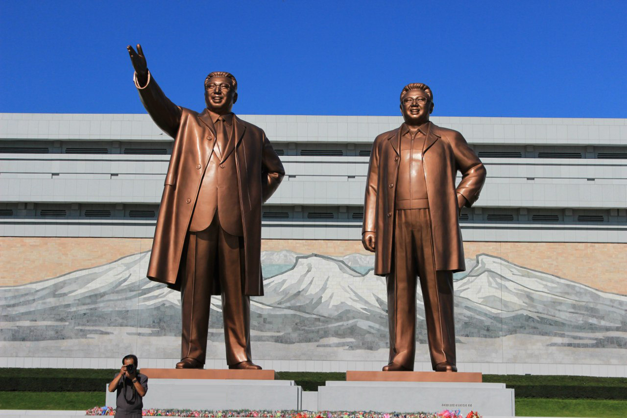 Памятник расположен в Пхеньяне на холме Мансуде. Фото сделано через несколько месяцев после открытия